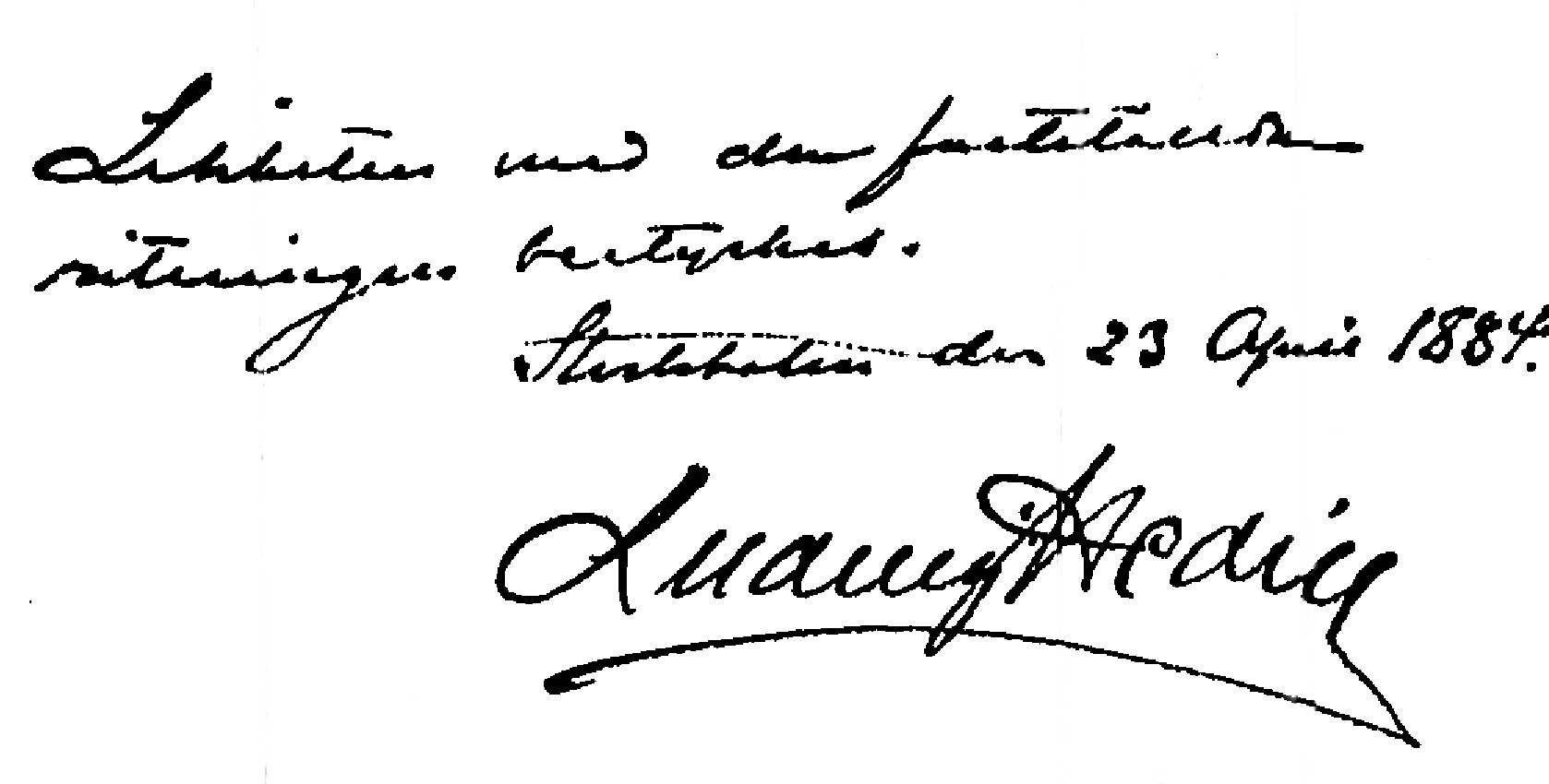 Stadsarkitekten Ludvig Hedins namnteckning: "Likheten med den fastställda ritningen bestyrkes. Stockholm den 23 april 1884"